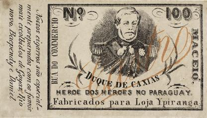 Rótulo de cigarro: Duque de Caxias, Herói dos Heróis no Paraguai. A coleção Brito Alves é composta de 1.252 rótulos de cigarros na técnica litográfica. Foi iniciada pelo comerciante Vicente de Brito Alves e continuada pelo seu filho, o advogado pernambucano José de Brito Alves (1887-1963). Em 1964 a coleção foi doada pela família ao então Instituto Joaquim Nabuco de Pesquisas Sociais. Constitui-se em um raro e valioso patrimônio cultural e artístico, registrando fatos históricos, usos, costumes e aspectos da vida cultural da sociedade brasileira e particularmente da pernambucana, no final do século XIX até as primeiras décadas do século XX.